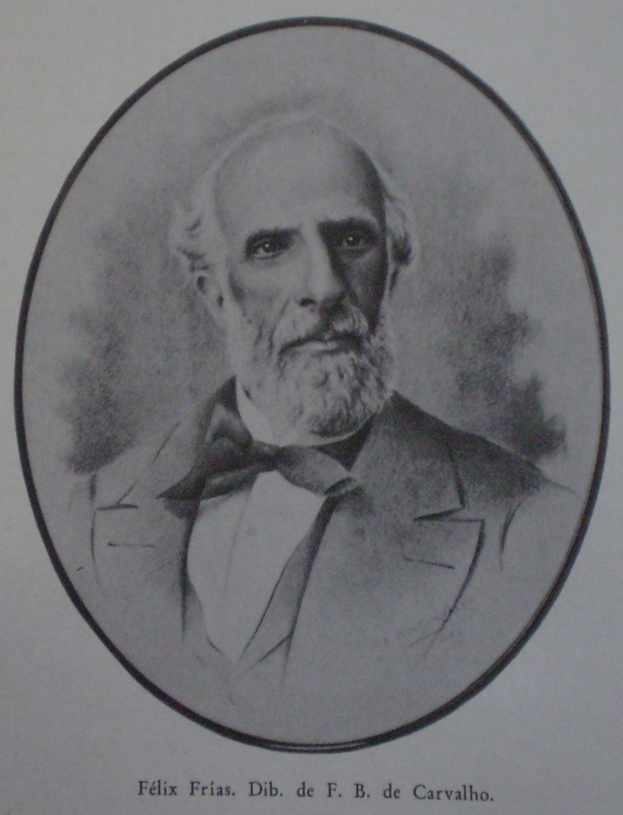 Félix Frías. Dibujo de F. de Carvalho 1870 Aprox.